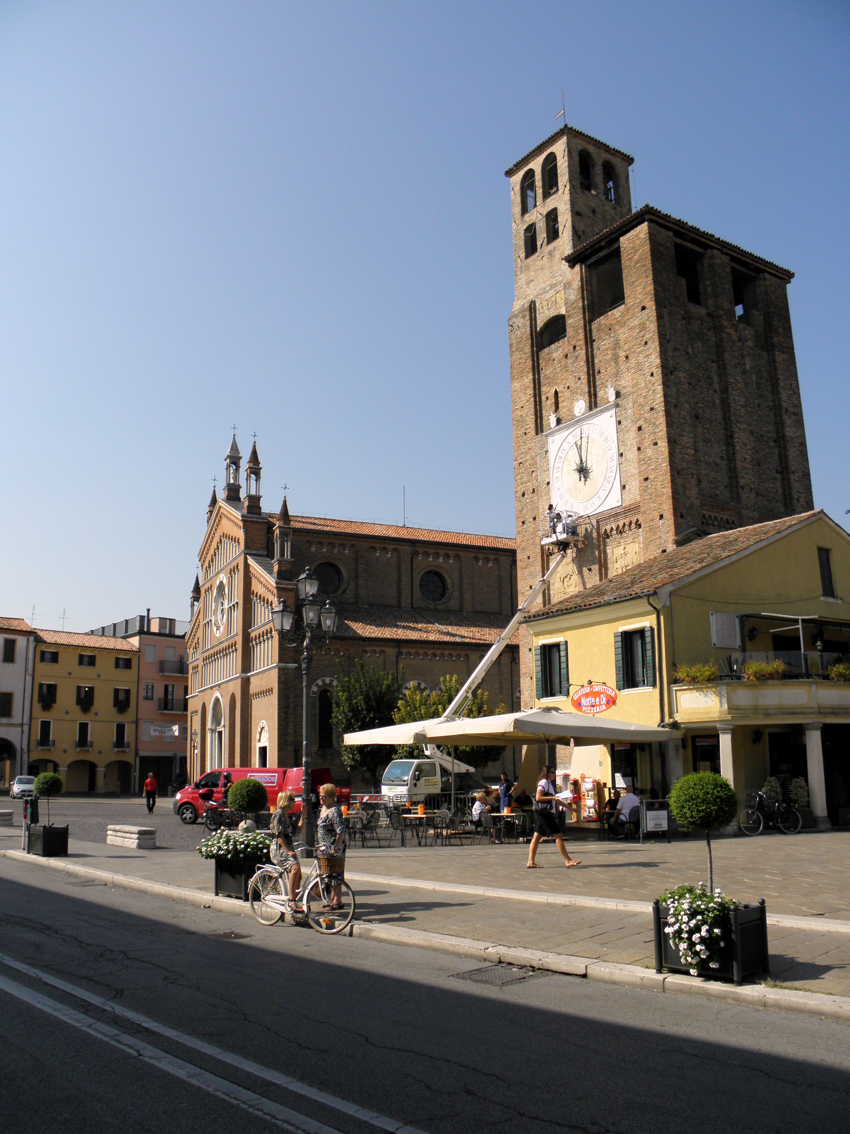 Piove di sacco: il Duomo e la Torre Carrarese che svolge anche la funzione di campanile.